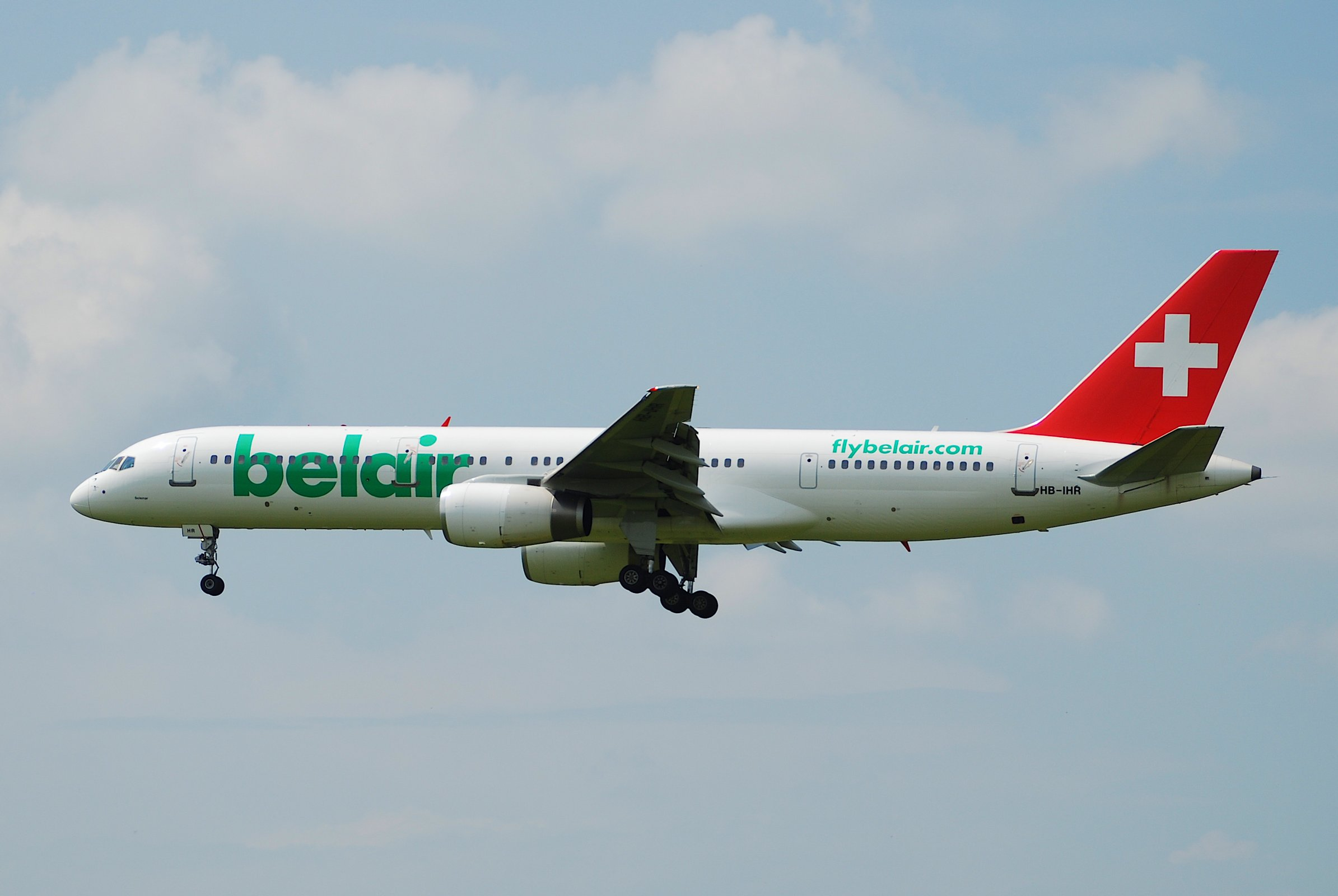 Belair Boeing 757-200; HB-IHR@ZRH;09.06.2007/472hc